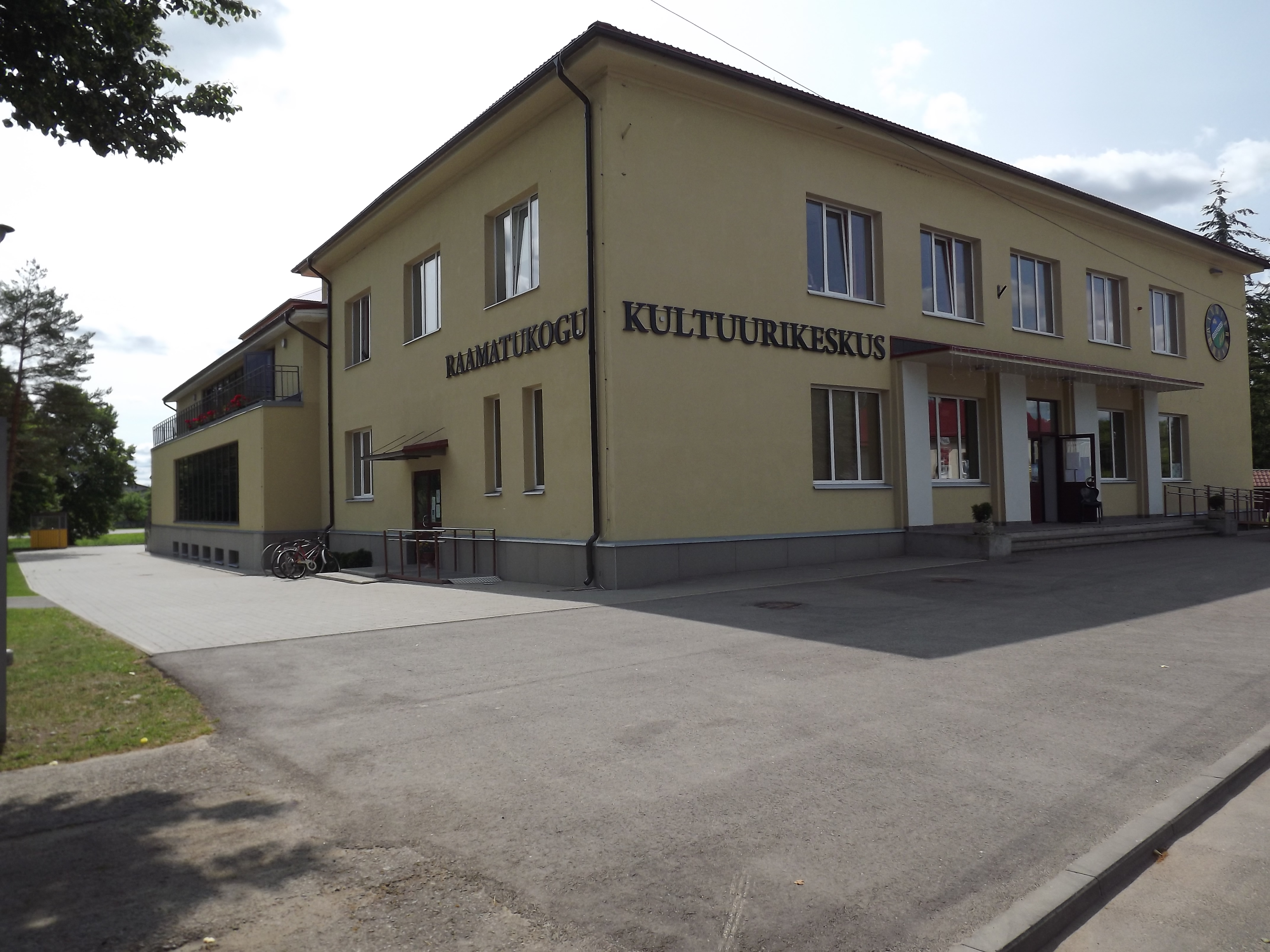 Mustvee Linnaraamatukogu